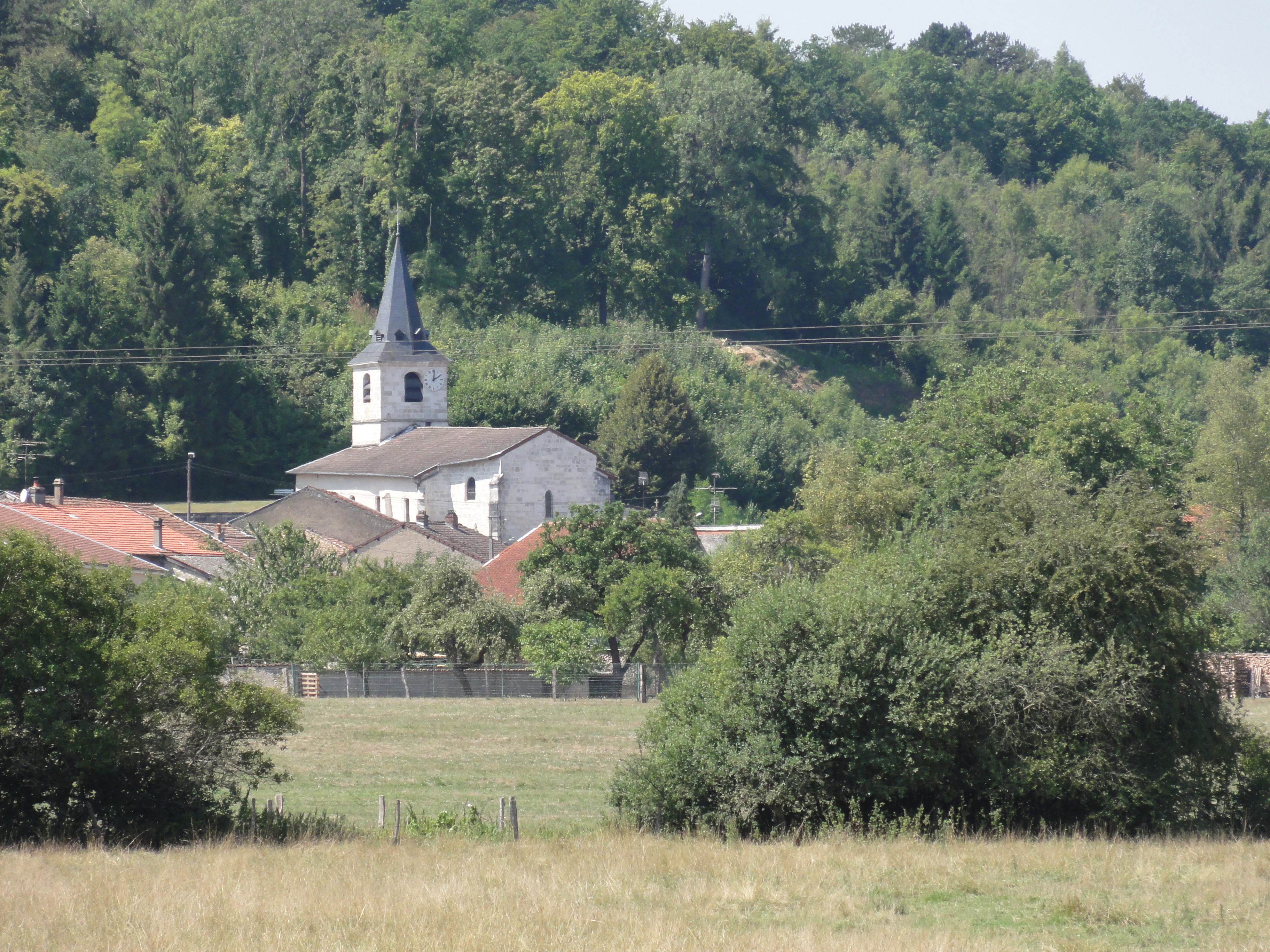 Kœur-la-Grande (Meuse) église